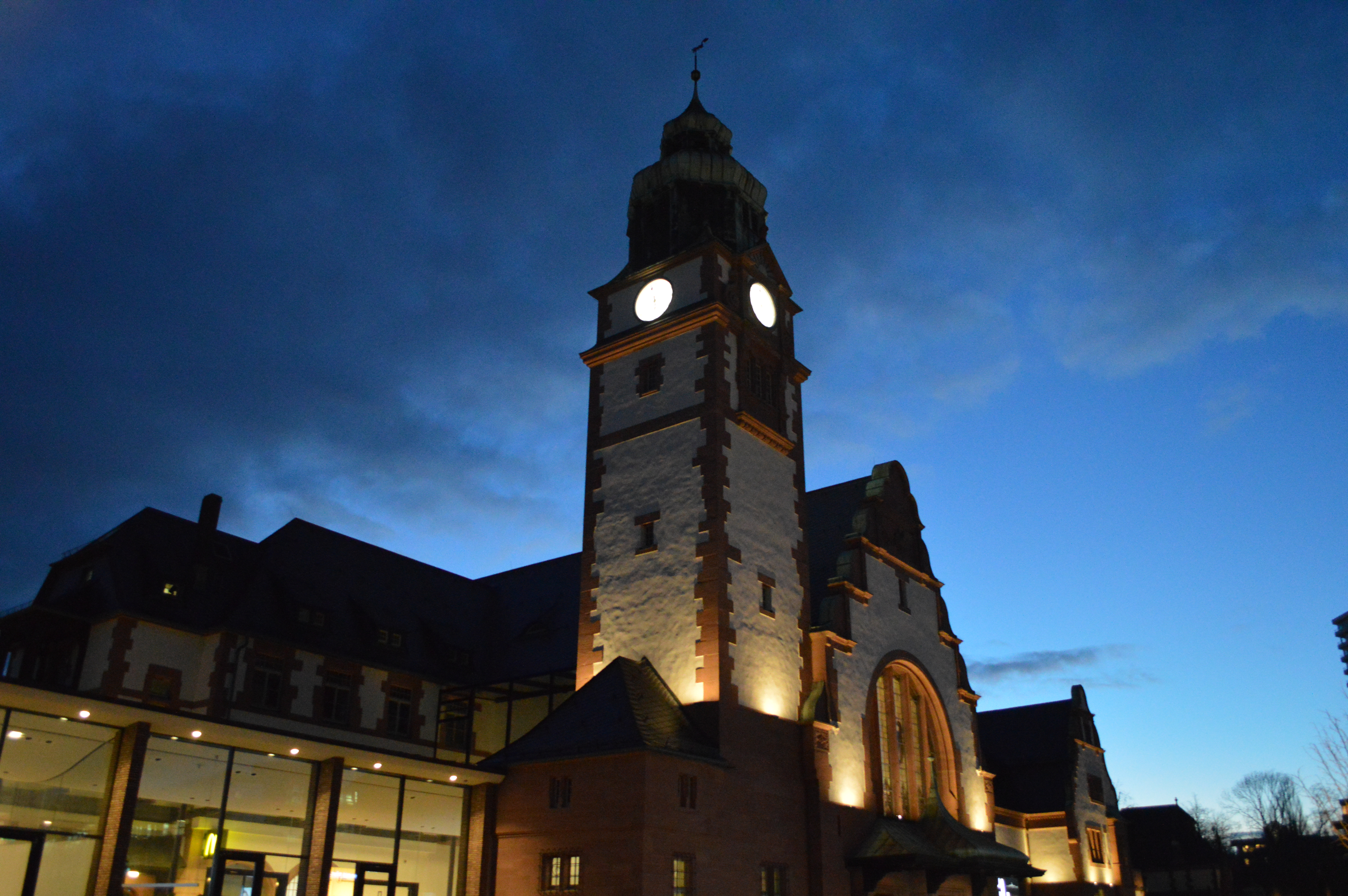 Bahnhof Bad Homburg Abend Februar 2017